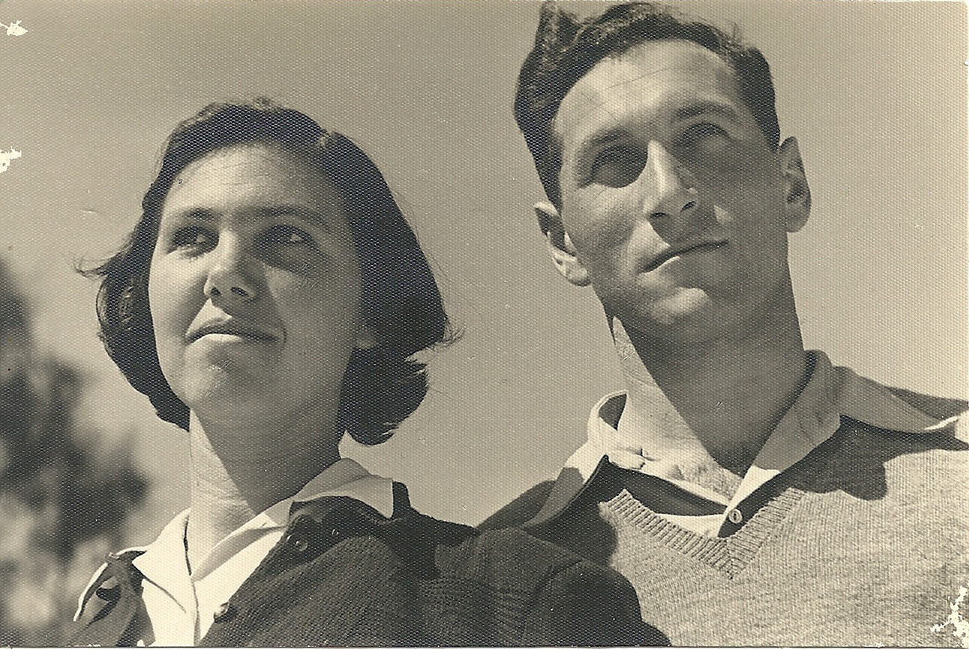 חיים והדסה מילר בשנת 1946